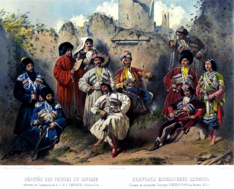 Депутаты кавказских племен, бывшие на коронации императора Александра II в 1856 г. Этнографическое описание народов России Густава-Федора Христиановича Паули